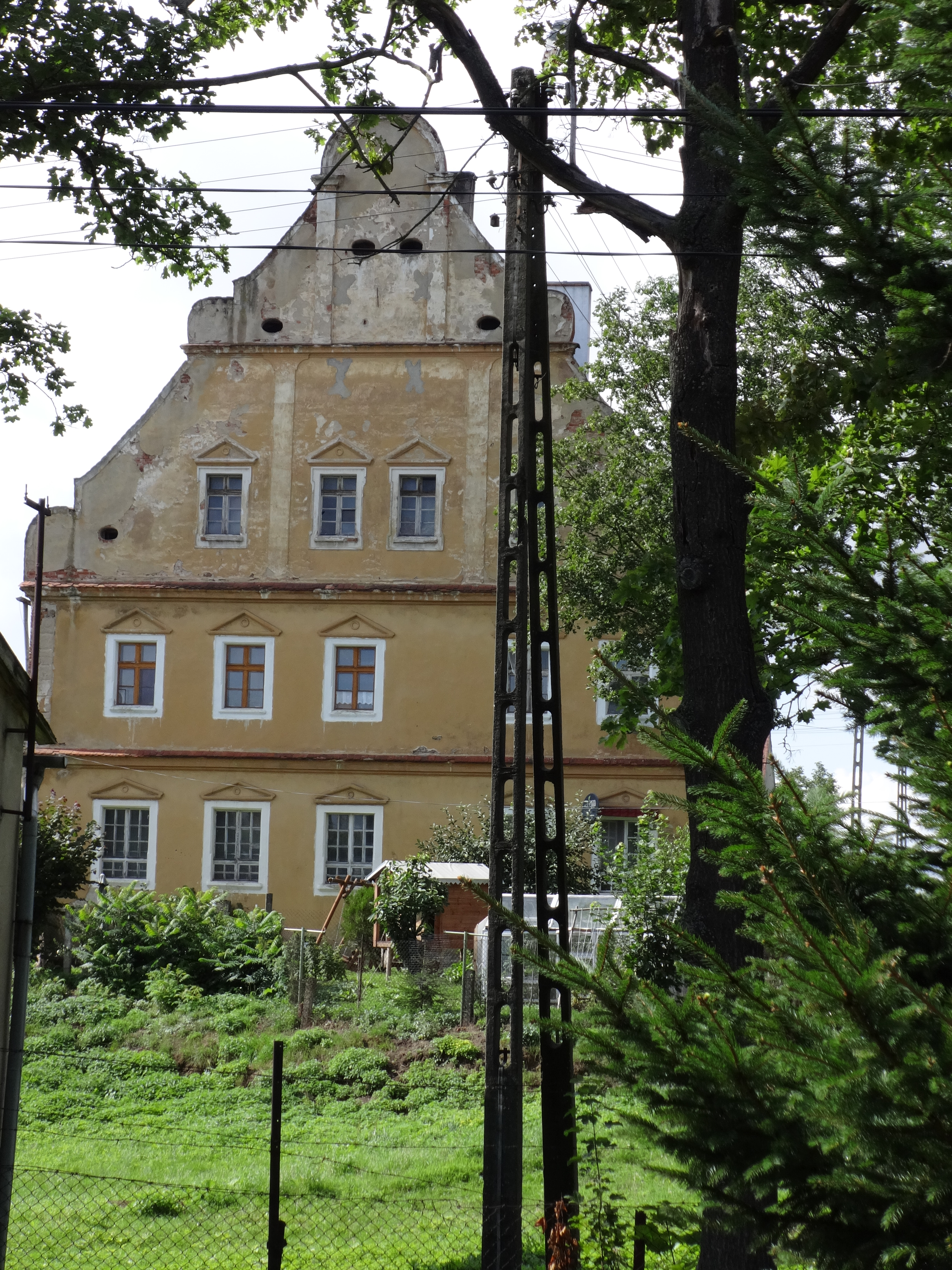 Janowa, dwór (nr 8), 2 ćw. XVII, ok. 1800